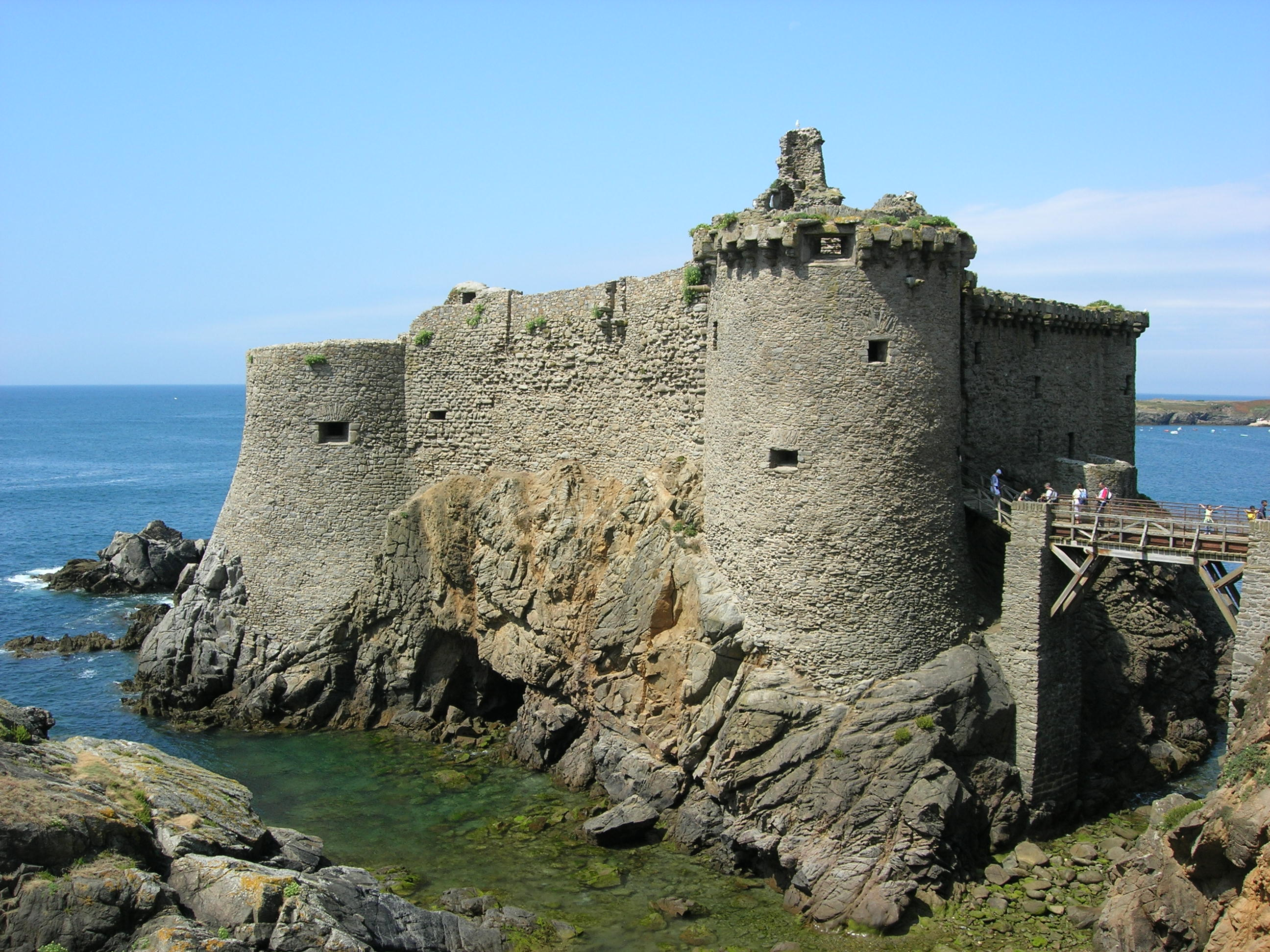 Vieux Chateau de l'Ile d'Yeu